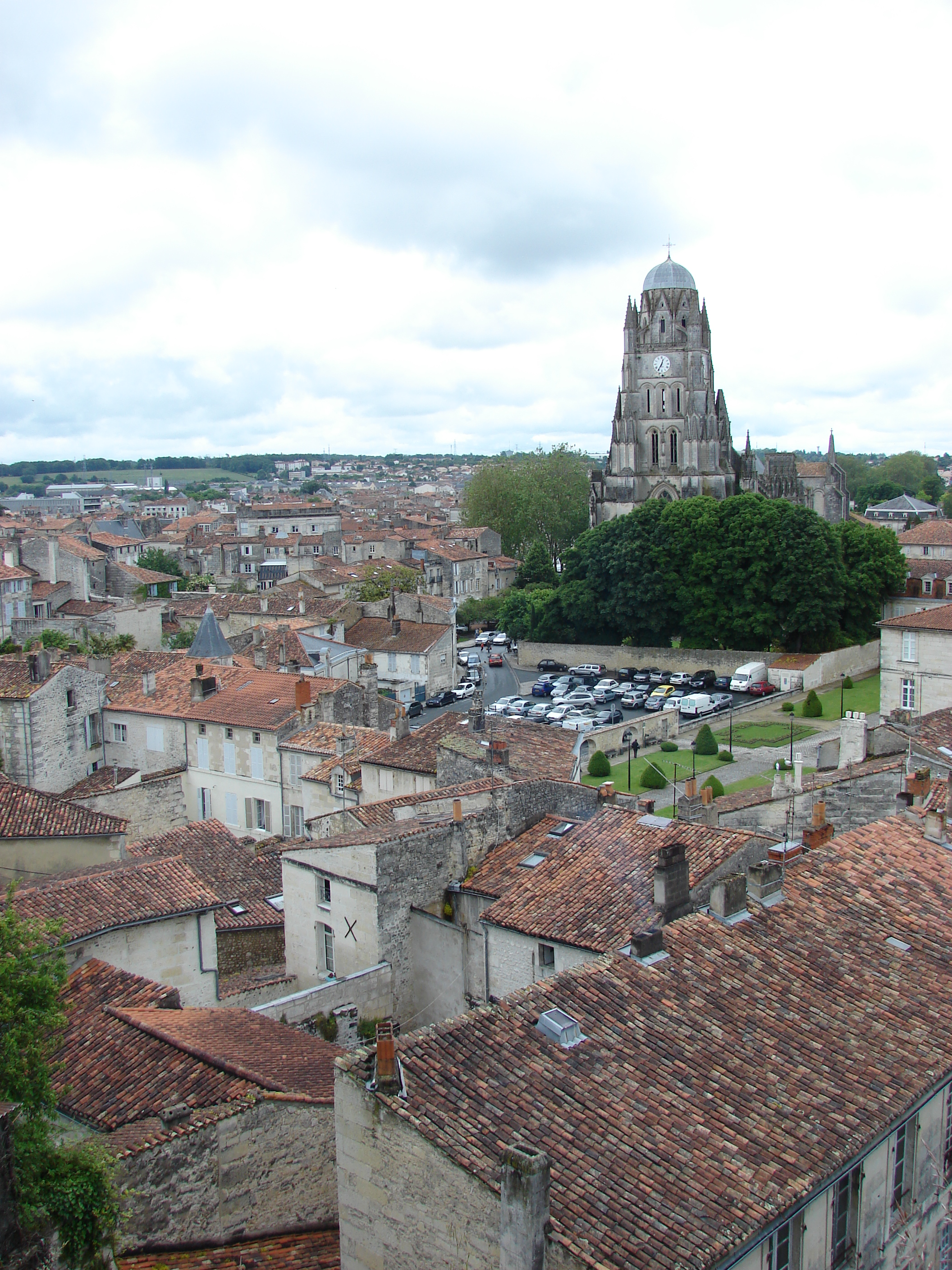 Cathédrale Saint-Pierre de Saintes, Saintes, Charente-Maritime, France